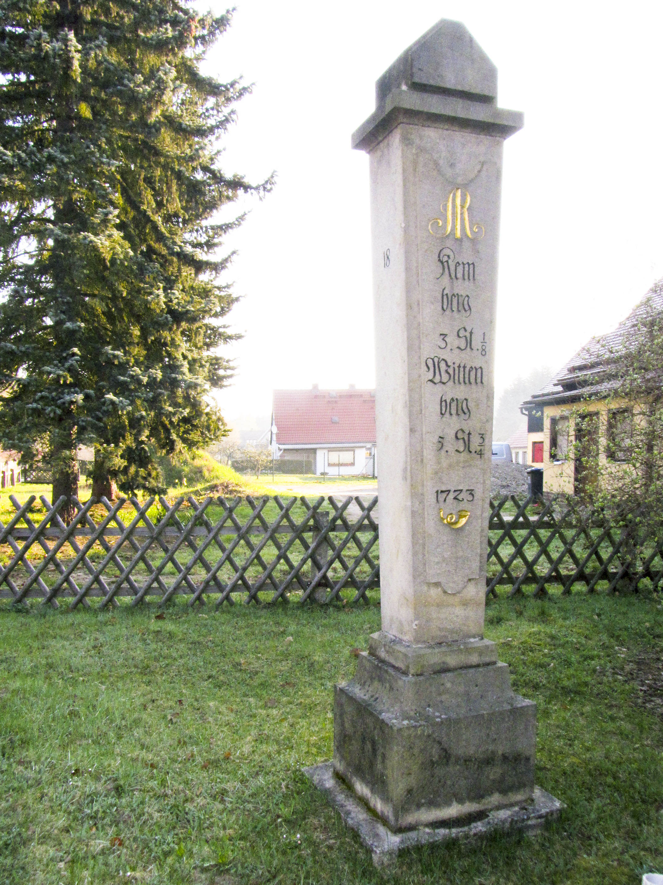 Kursächsische Halbmeilensäulen Nr. 18 Eisenhammer, an der Kreuzung B 2 / K 2029 bei Tornau.